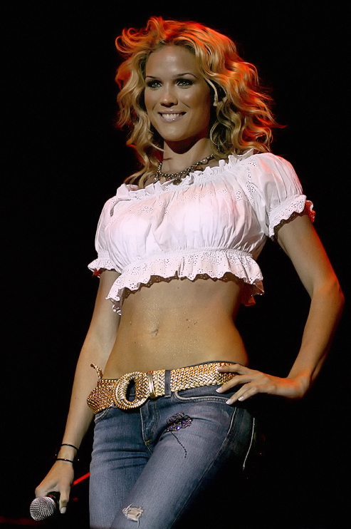 Marie @ Gatufesten in Sundsvall, Sweden. July 2006.